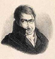 Christian David Gebauer (15.10.1777-15.9.1831), dansk maler